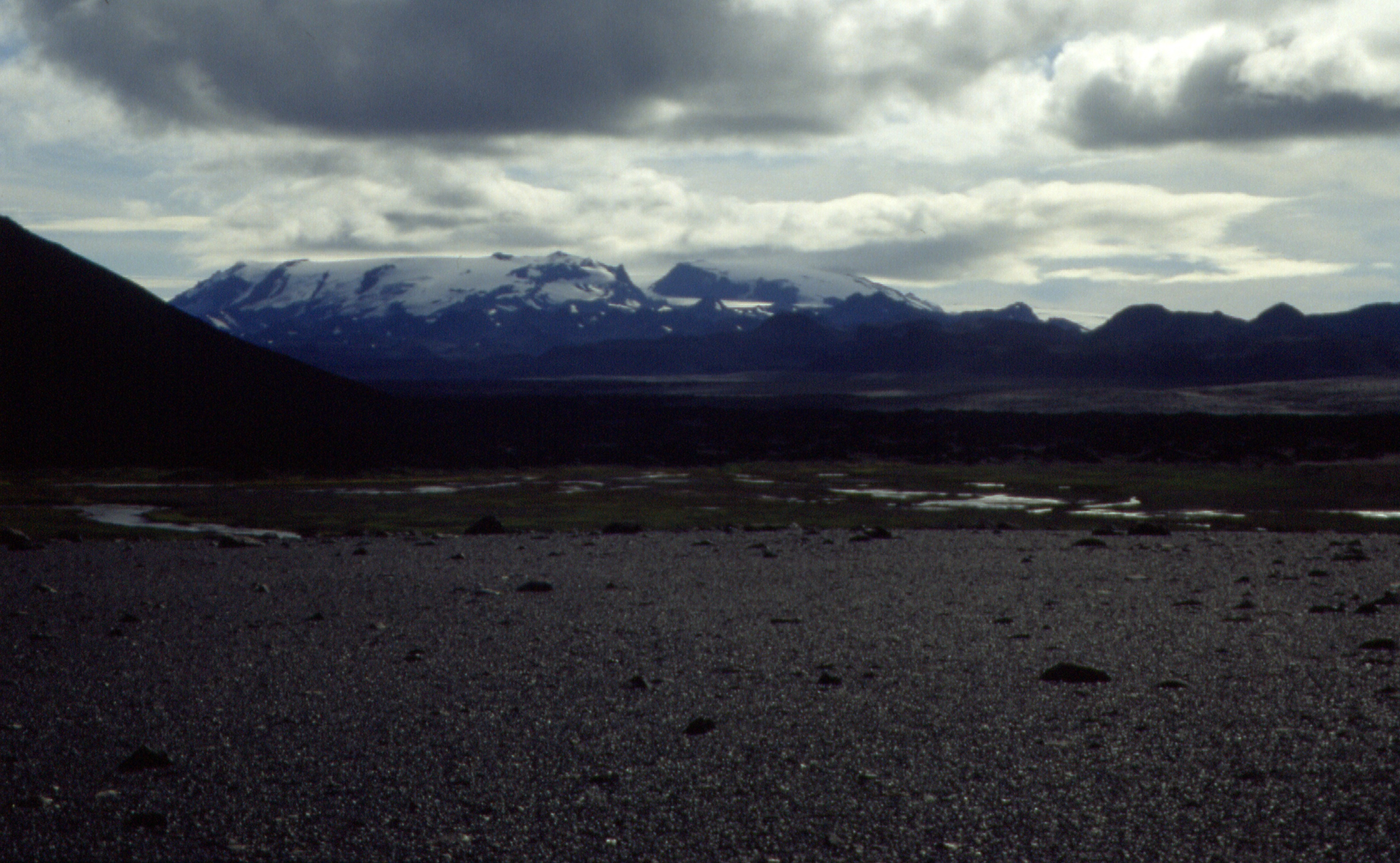 Kverkfjöll